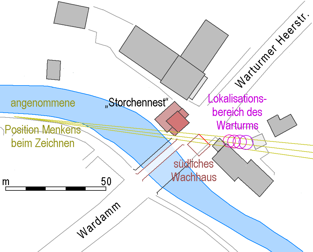 Lokalisationsversuch für den Warturm in der heutigen Umgebung des Gasthauses zum Storchennest anhand der Zeichnung von Johann Heinrich Menken